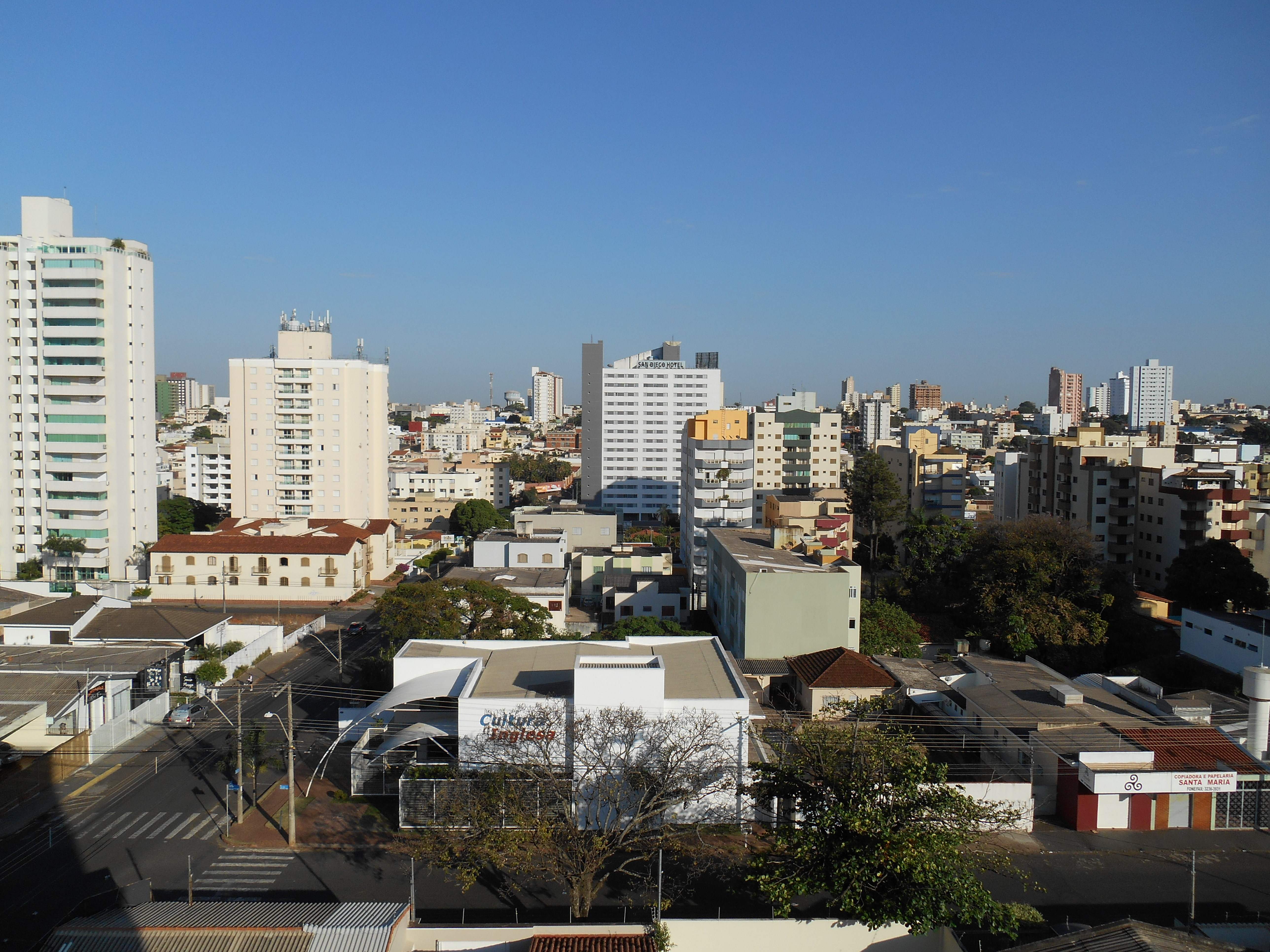 Cidade de Uberlândia